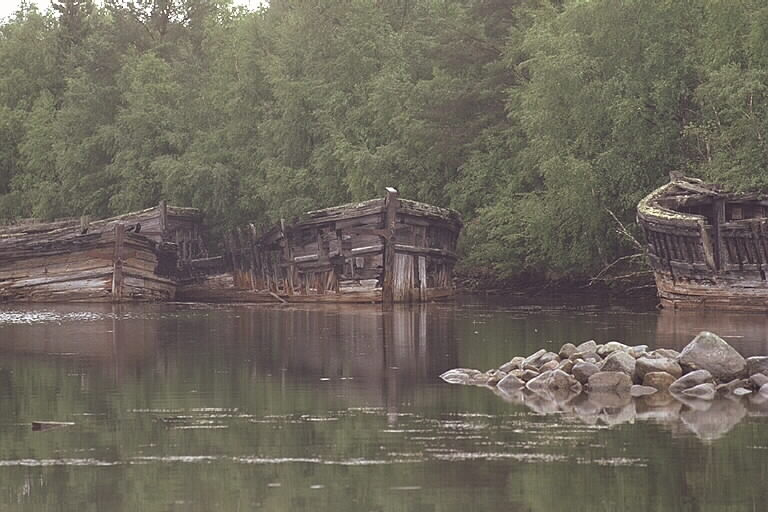 Vrak av gamla virkespråmar.; Byggnadsverk; Hantverk och manufaktur; Sågverk